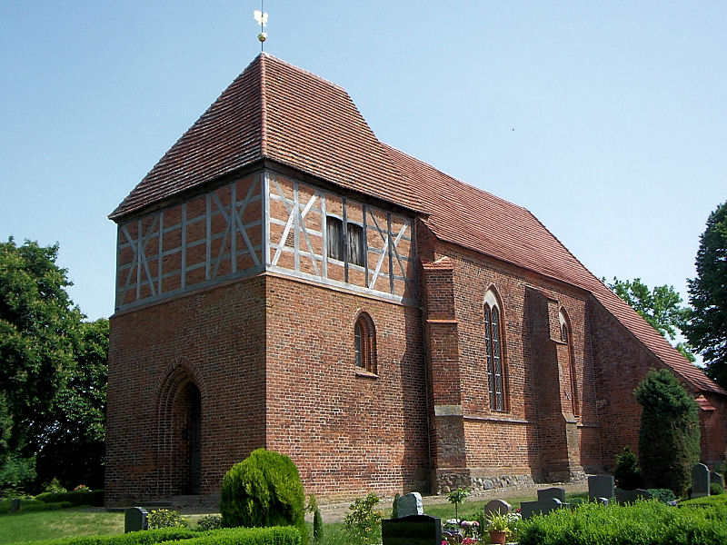 Kirche in Retgendorf, Landkreis Parchim